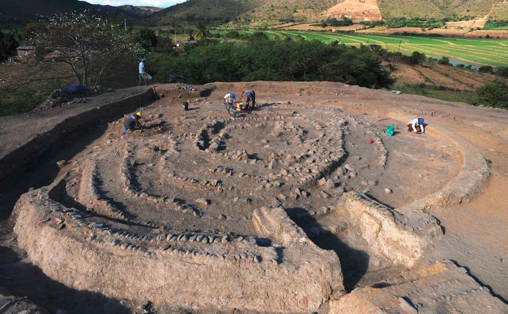 Casual